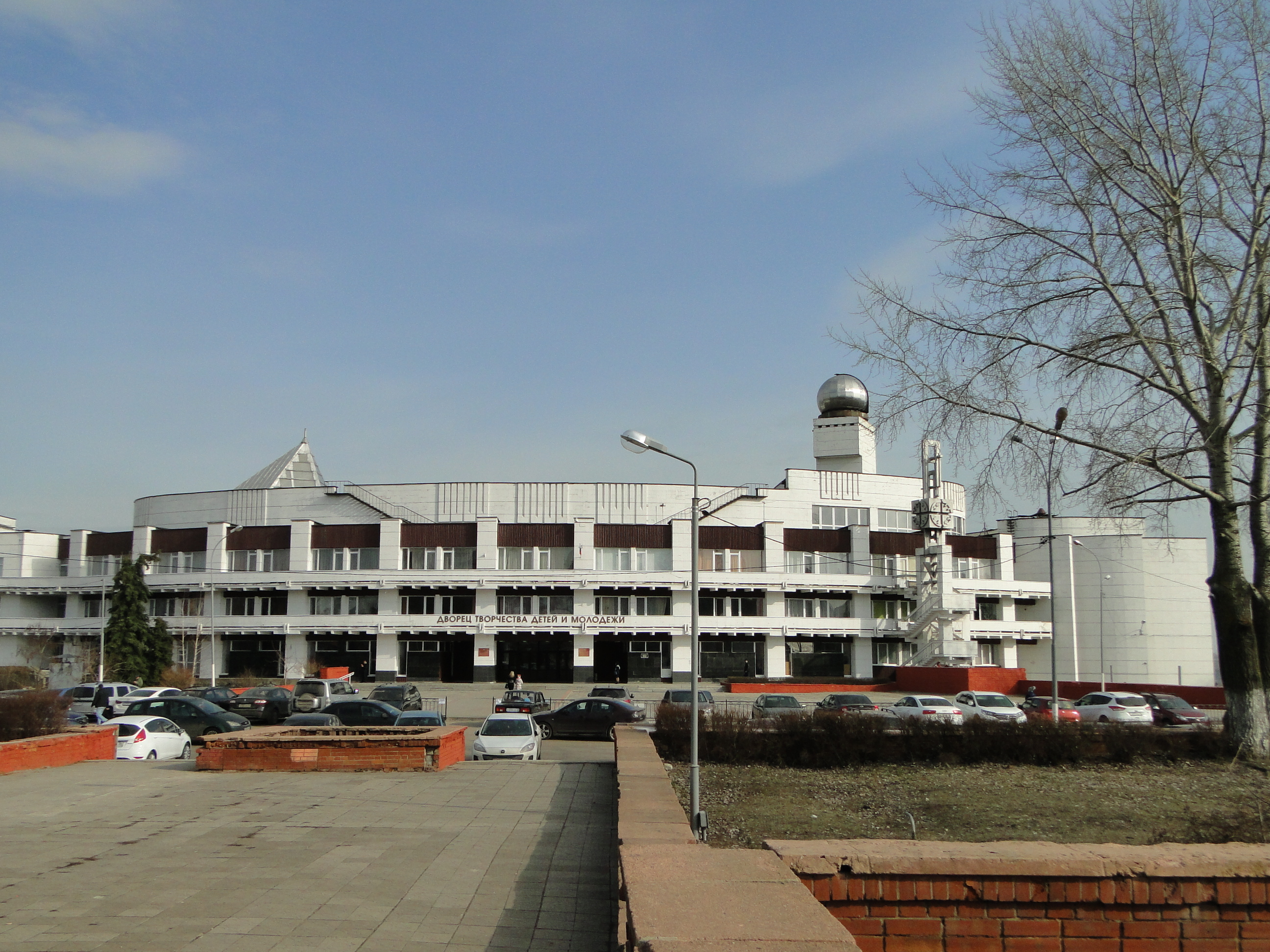 Дворец творчества детей и молодежи